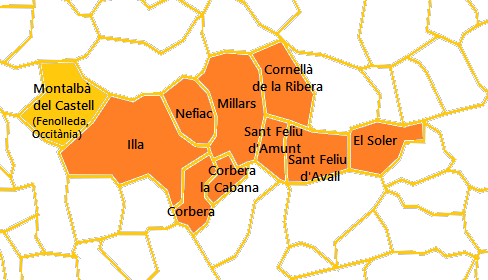 Mapa del Cantó de la Vall de la Tet elaborat a partir d'un mapa de lliure disposició